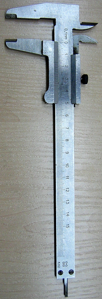 Nihik